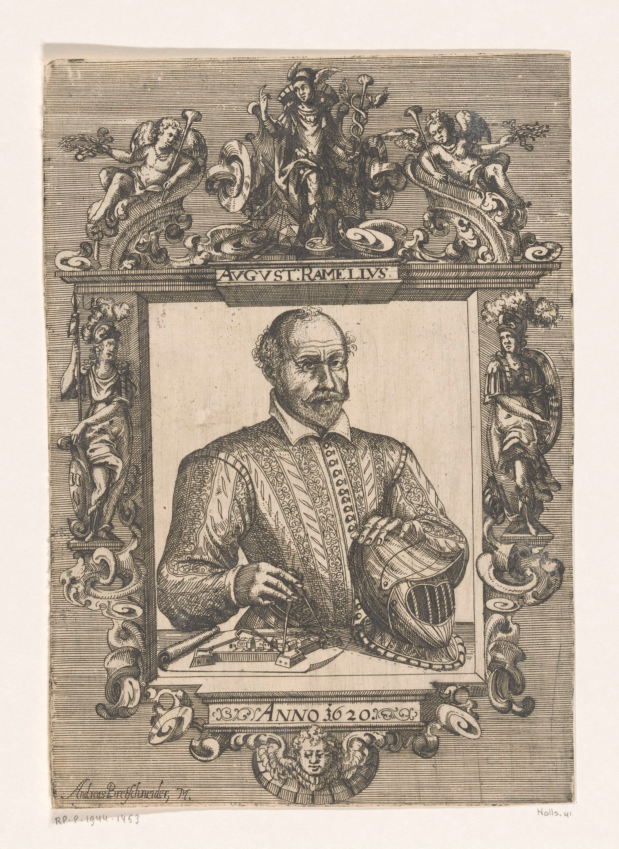 IdentificatieTitel(s): Portret van Agostino RamelliObjecttype: prent Objectnummer: RP-P-1944-1453Catalogusreferentie: Hollstein German 41Opschriften / Merken: verzamelaarsmerk, verso, gestempeld: Lugt 2228VervaardigingVervaardiger: prentmaker: Andreas Bretschneider (vermeld op object)Plaats vervaardiging: LeipzigDatering: 1620Materiaal: papier Techniek: etsenAfmetingen: blad: h 225 mm (binnen de plaatrand afgesneden) × b 157 mm (binnen de plaatrand afgesneden)ToelichtingPrent gebruikt voor: Ramelli, Agostino. Schatzkammer Mechanischer Künste (...). Leipzig: Groß, 1620.OnderwerpWat: historical personshelmetcompassesfortifications, military engineeringmodel ~ architecturefantasy ornamentWie: Agostino RamelliVerwerving en rechtenVerwerving: onbekend 1944Copyright: Publiek domein